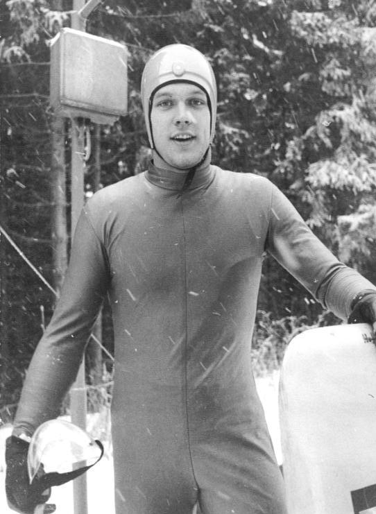 Jörg Hoffmann ADN-ZB Schaar 5.1.1985-Bez. Suhl: Vorschaumotiv zu den XXIV. Weltmeisterschaften im Rennschlittensport vom 21. bis 28. Januar 1985 in Oberhof-Der 21jährige Olympiadritte von Sarajevo im Doppelsitzer Jörg Hoffmann (ASK Vorwärts Oberhof), geht mit seinem Partner Jochen Pietzsch als Titelverteidiger an den Start. Bei den diesjährigen DDR-Meisterschaften auf der WM-Bahn, die bereits am 29.-30.12.1984 ausgetragen wurden, wurde er Titelträger im Einsitzer (Foto) und Doppelsitzer.